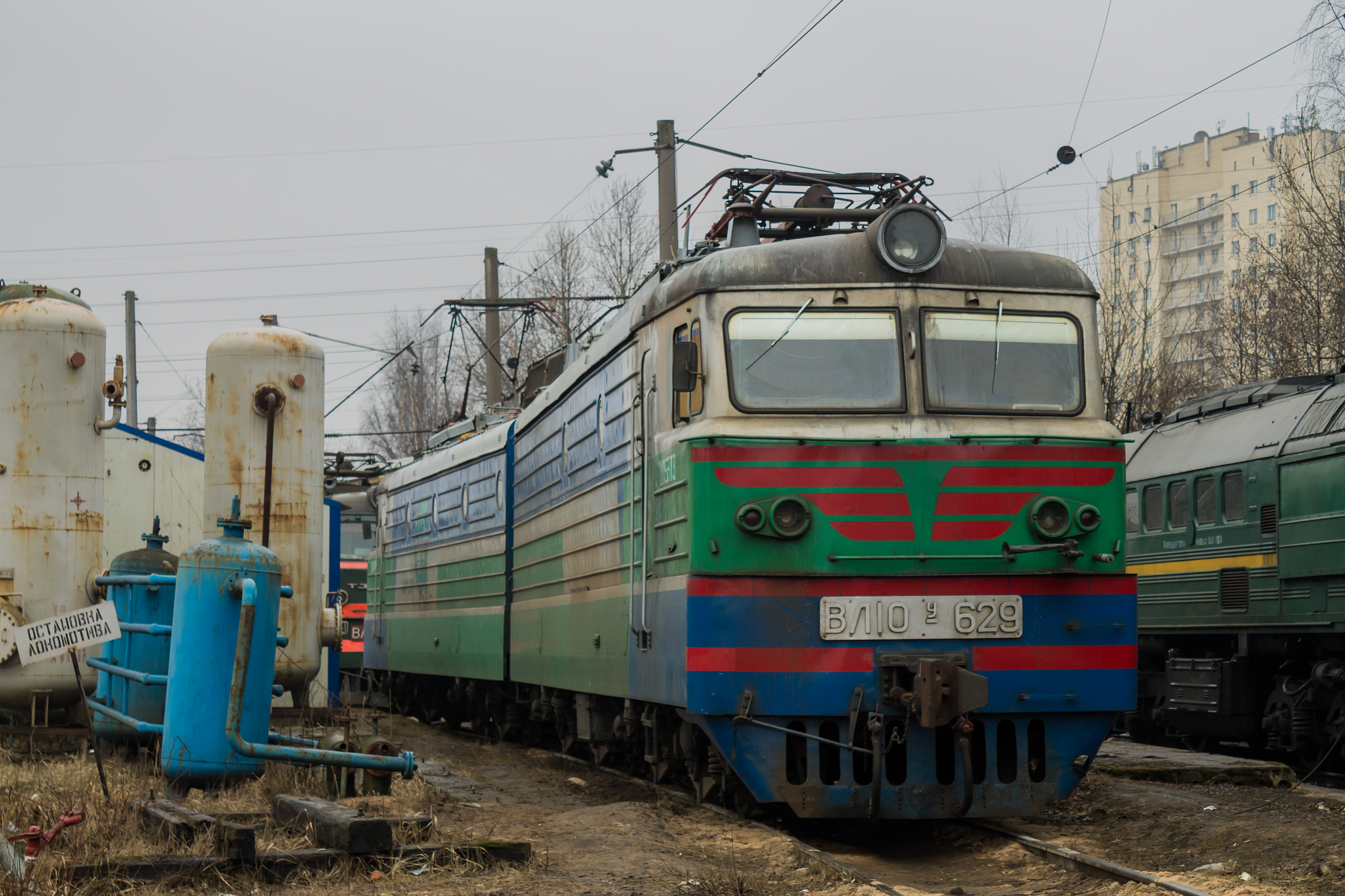 ВЛ10У-627, ПТОЛ Ручьи см. фото 692441 в альбоме автора